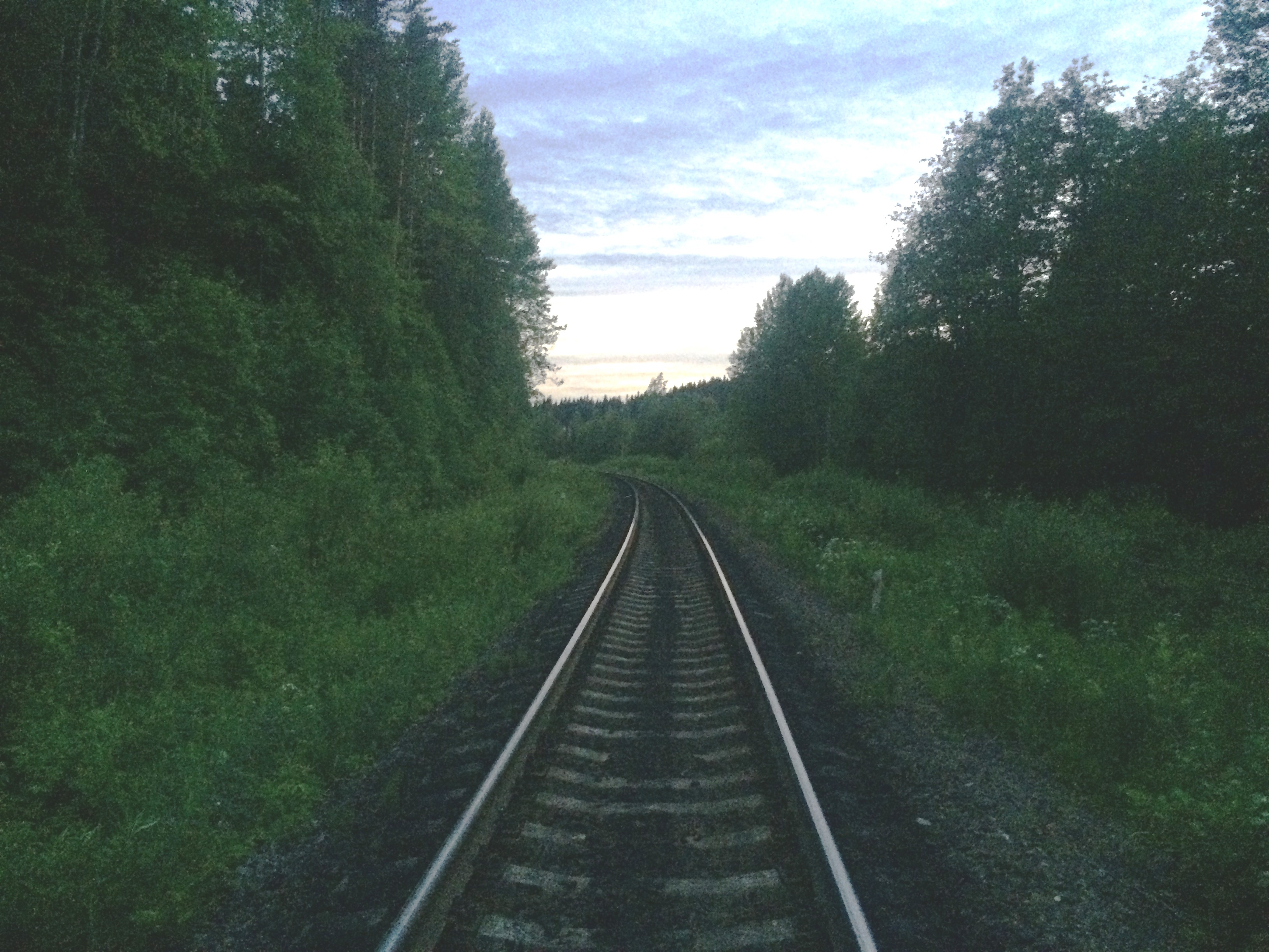 пп. Хелюля